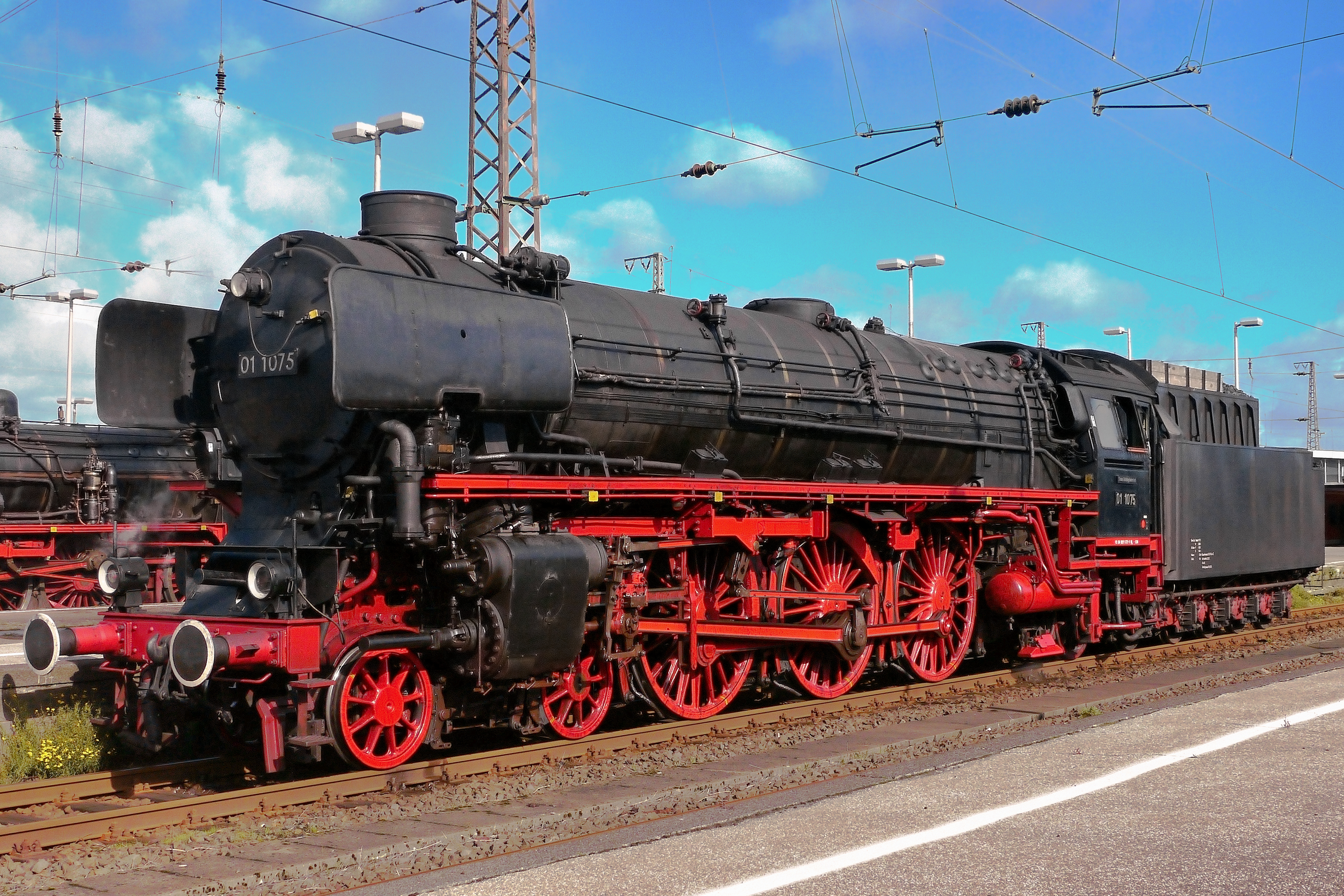 Die Schnellzug-Dampflokomotive 01 1075 der Stoom Stichting Nederland anlässlich einer Sonderfahrt nach Königswinter im Oberhausener Hauptbahnhof. Auf dem Nachbargleis 38 2267 des Eisenbahnmuseums Bochum-Dahlhausen.